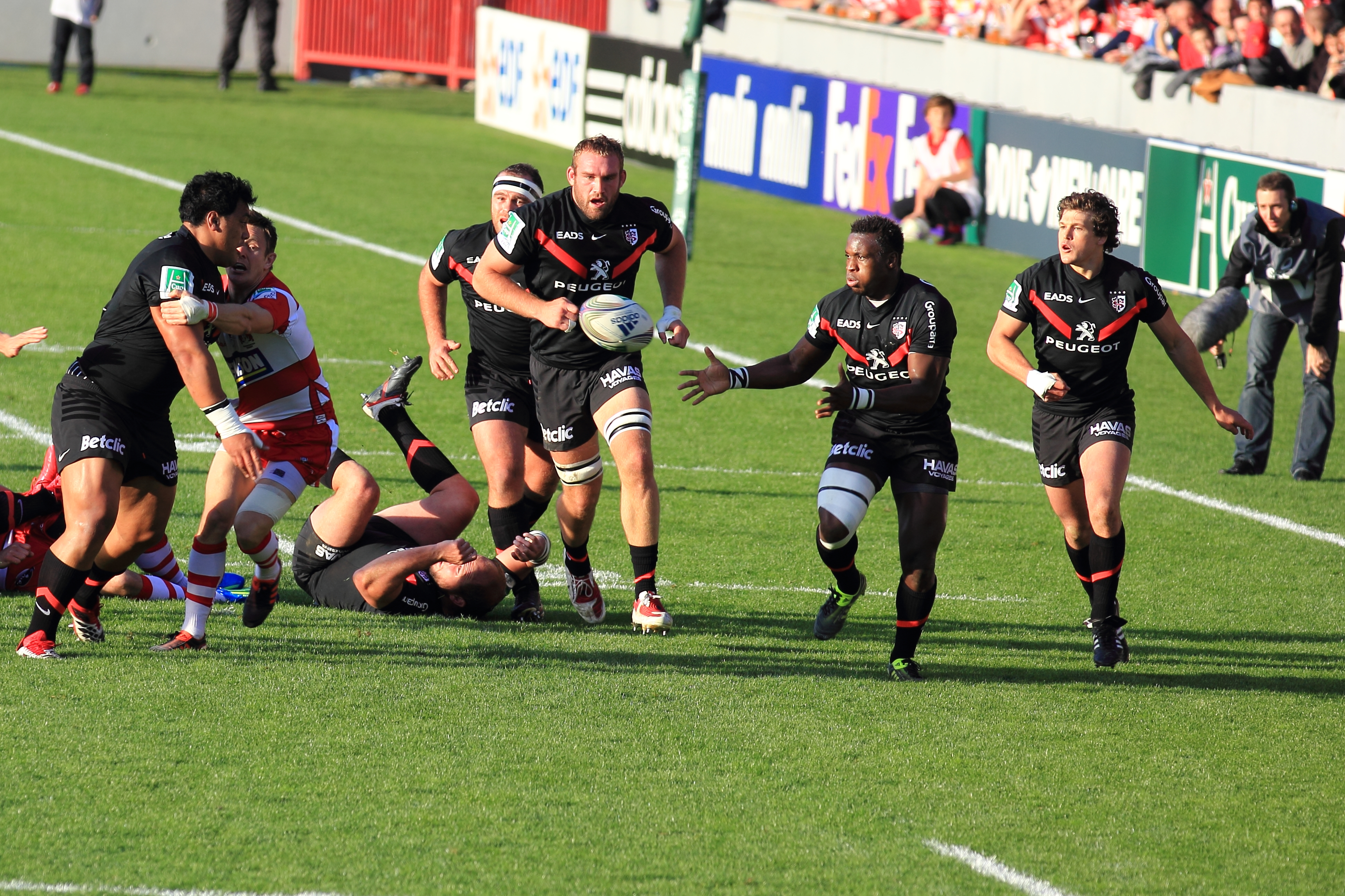 Heineken Cup — 13 November 2011, Stade Ernest Wallon. Match between: Stade toulousain — Gloucester Rugby